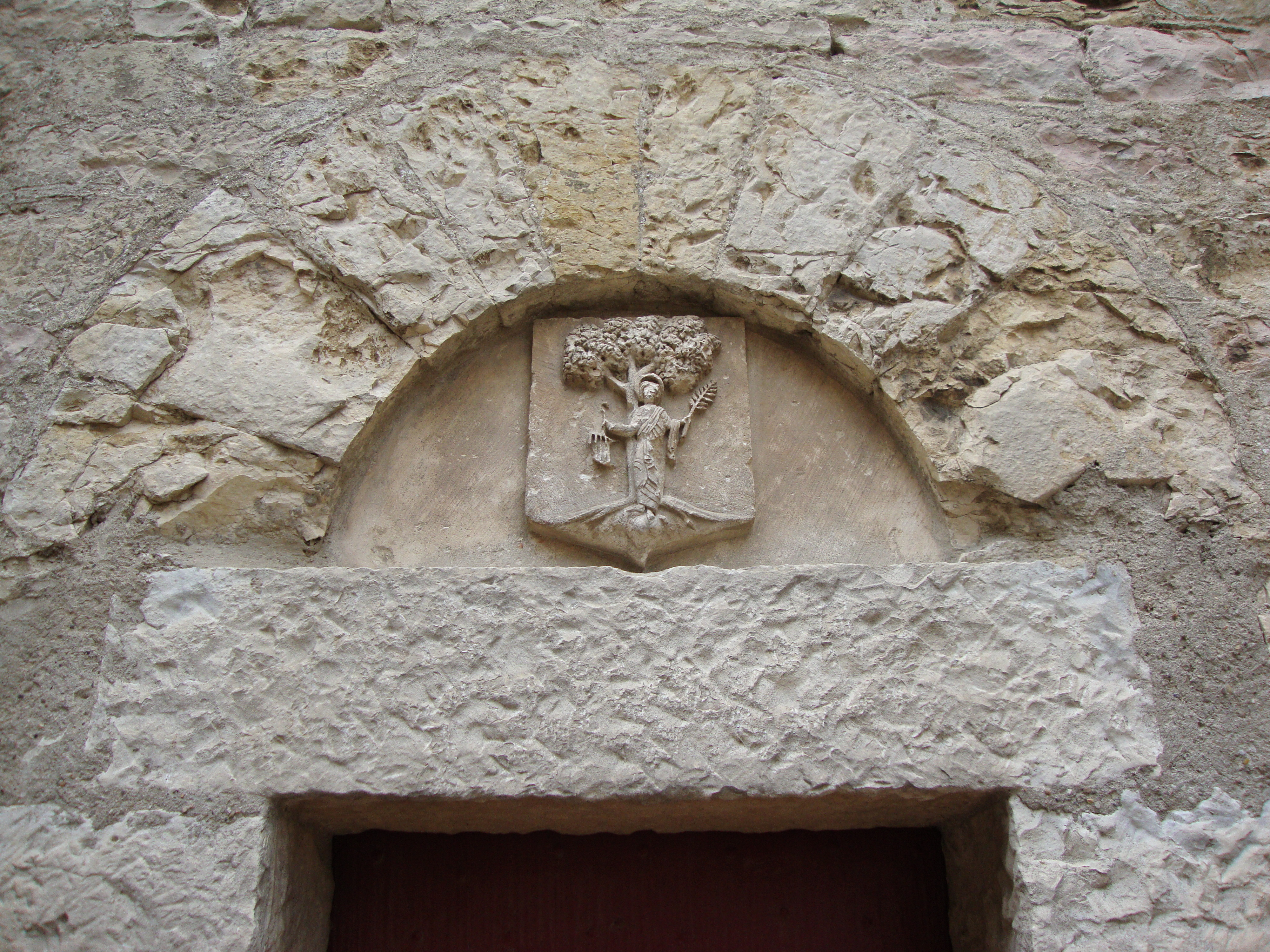 St.Laurent-des-Arbres (Gard, Fr) blason en relief au-dessus d'une porte de l'église-château